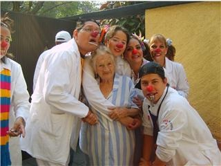 Voluntarios de risaterapia